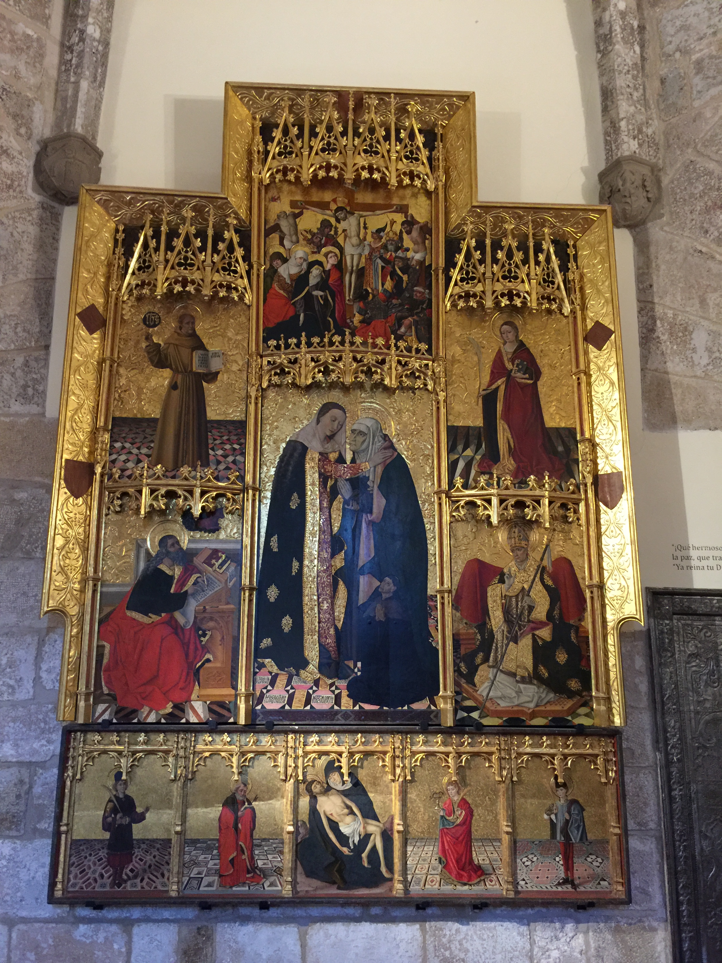 Peinture sur bois exotique peut-être provenant d'Afrique. Au centre, Visitation de la Vierge Marie à sa cousine Élisabeth, avec le Calvaire en haut et une Pieta en bas. À gauche, Saint Bernard et Saint Luc. À droite, une sainte martyre non identifiée et un saint évêque.